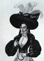 Ida Henriette da Fonseca i rollen som Pamela i Aubers opera "Fra Diavolo"